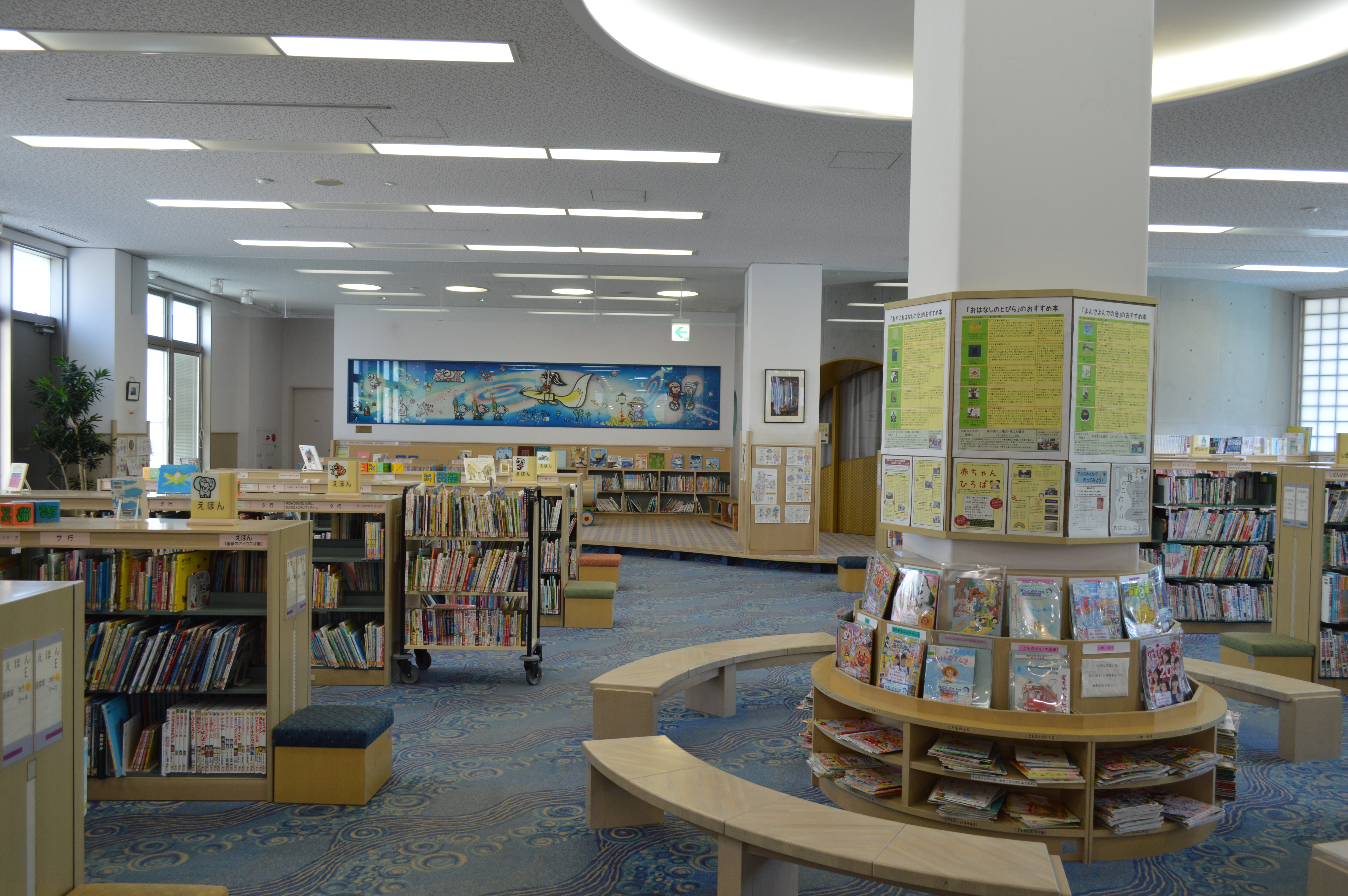 愛知県豊川市の豊川市中央図書館。